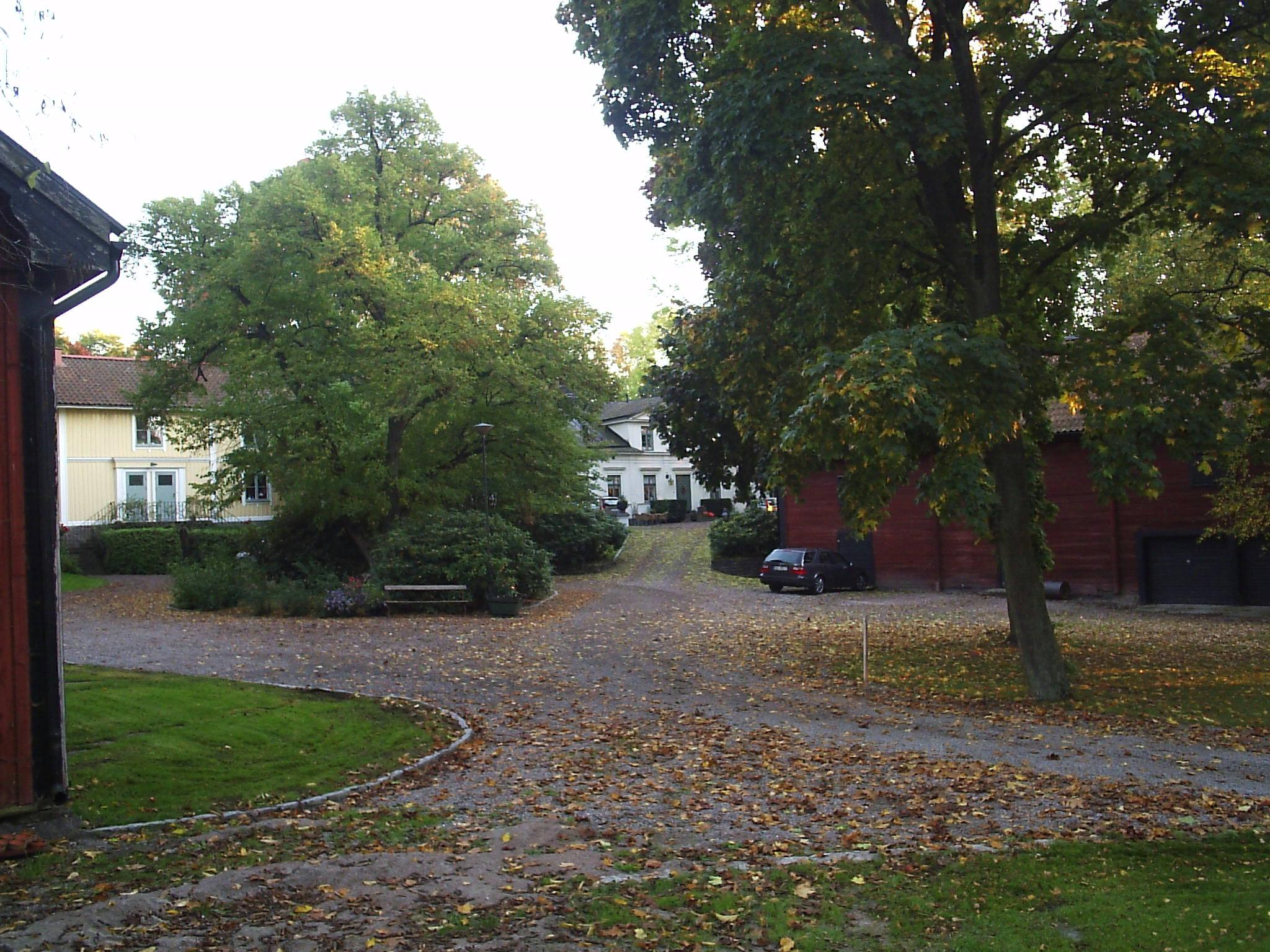 Fiskeby bruks herrgård i Norrköping, den äldre till vänster och den yngre till höger. Bilden är fotograferad av Harri Blomberg.